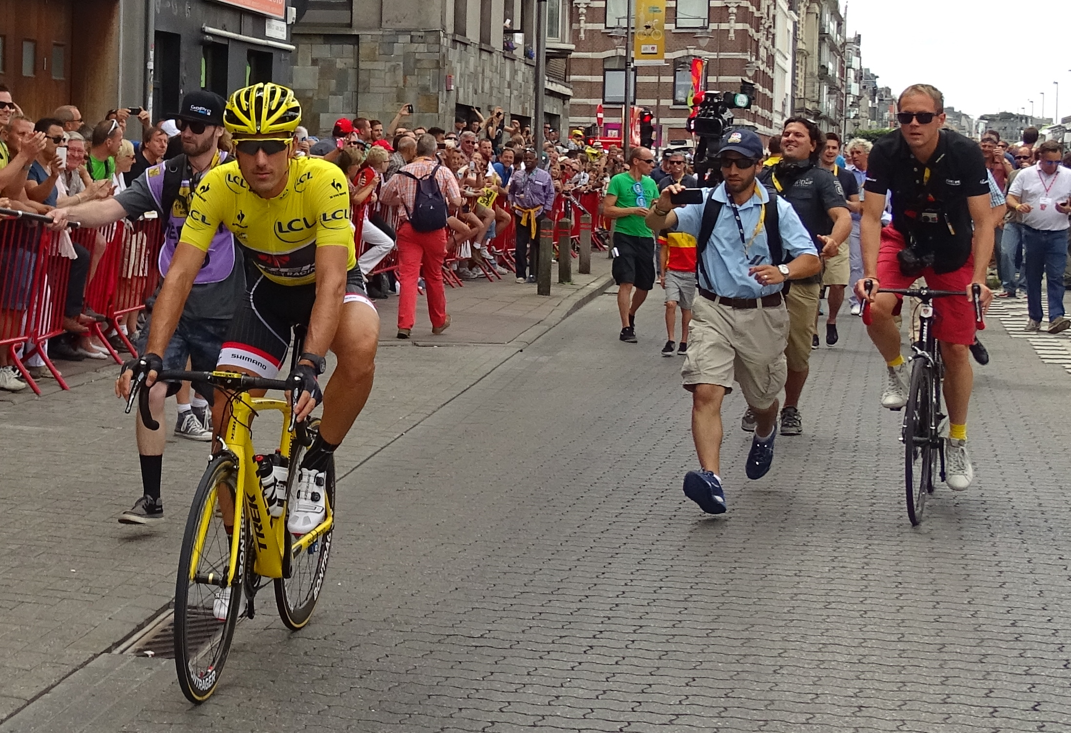 Reportage réalisé le lundi 6 juillet à l'occasion du départ de la troisième étape du Tour de France 2015 à Anvers, Belgique.